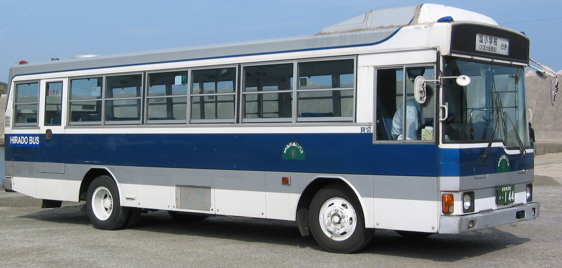 平戸バス（正式名称：早田商店） 平戸ふれあいバスの車両